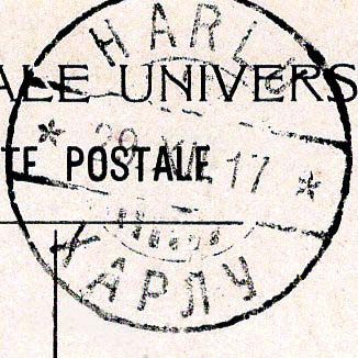 Почтовый штемпель Харлу. Видна дата 29 декабря 1917 года и название населённого пункта на финском и русском языках